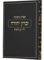 תמונת הספר שו"ת זכרון יהודה לרבי יהודה בן הרא"ש